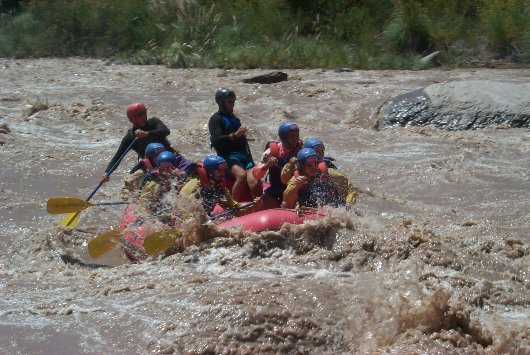 Rafting en Río Mendoza, Provincia de mendoza, Argentina.